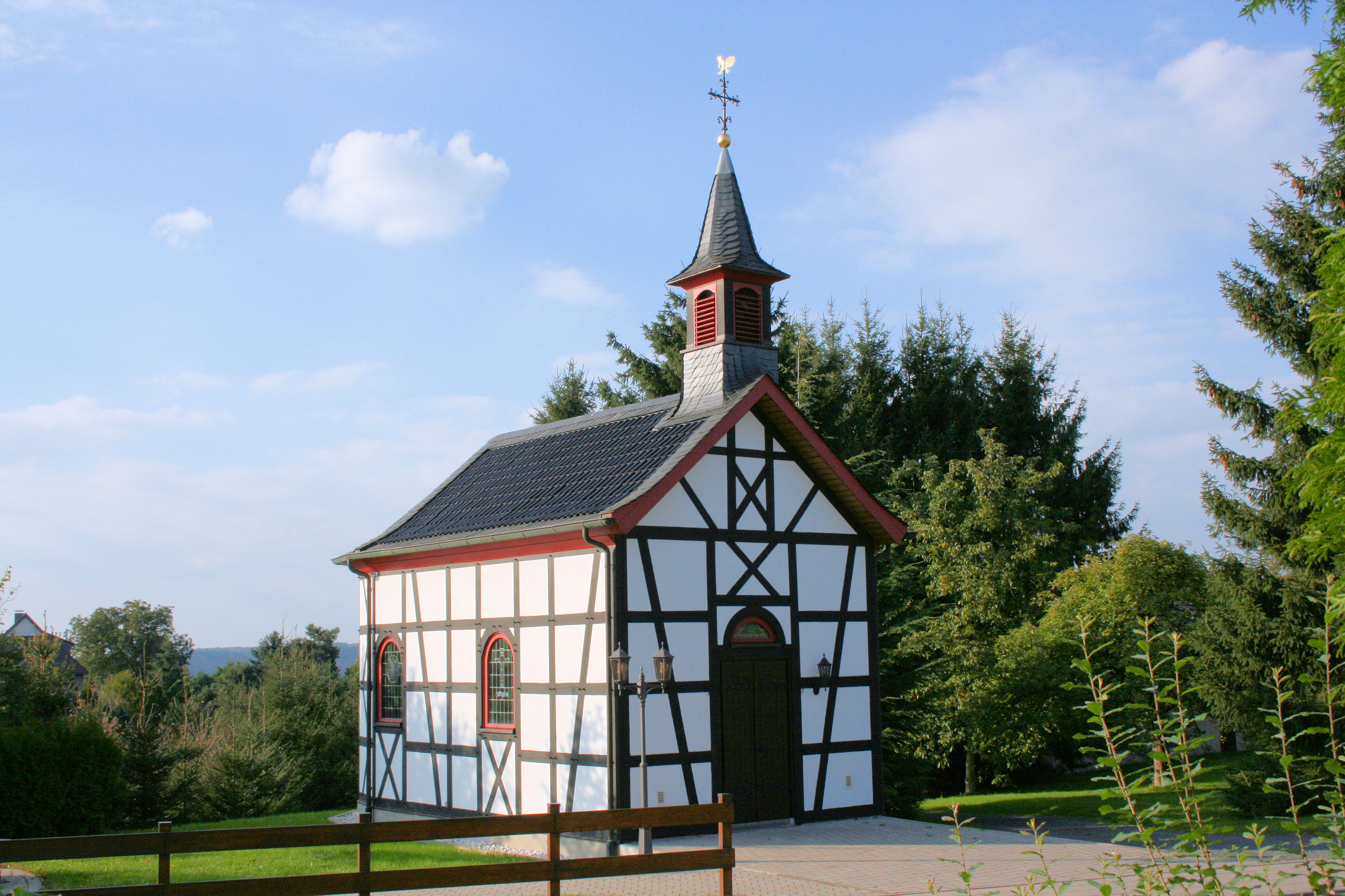 St. Josephskapelle, Mertener Straße 27, Mittelscheid, Stadt Hennef (Sieg)